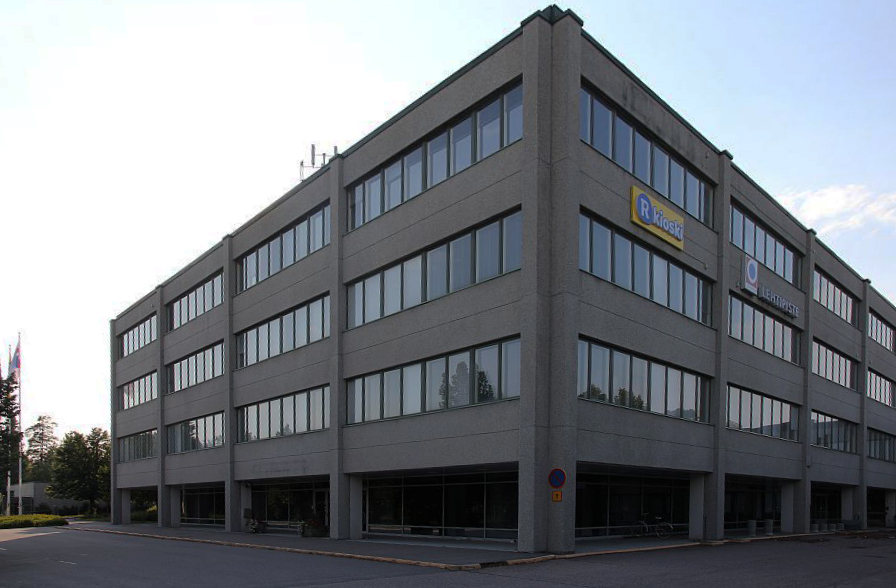 R-Kioski Oy:n pääkonttoria: Koivuvaarankuja 2, 01640 Vantaa. Huom: Muista säilyttää viittaus kuvaajaan, mikäli käytät kuvaa.